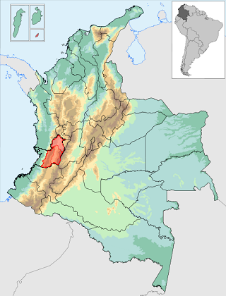 ubicacion geografica de la zona donde se habla en castellano Vallecaucano